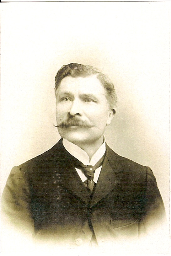 Charles Lecour inventeur de la boxe française